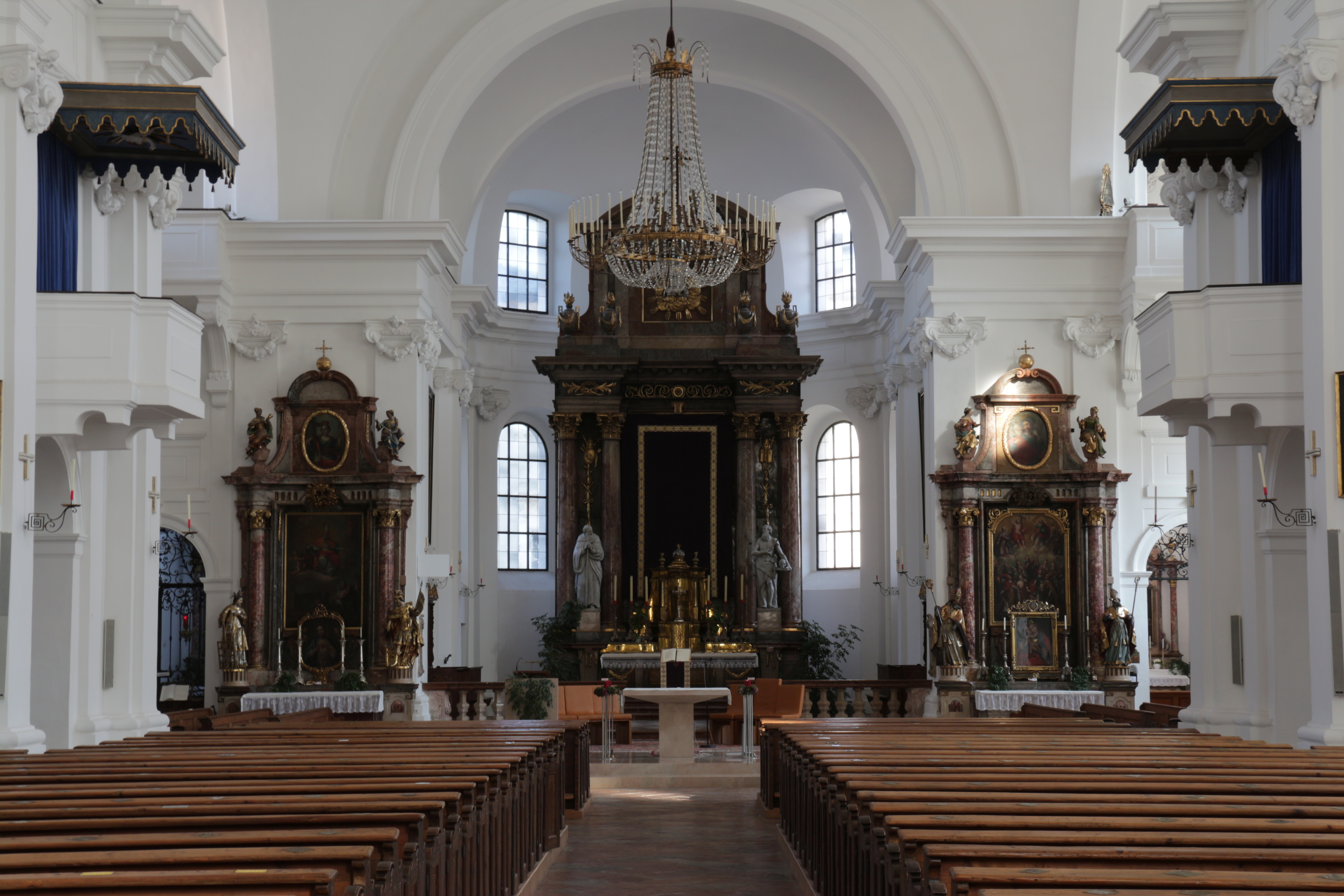 Altar in der Stadtpfarrkirche St. Antonius Eremit (Antonius der Große) in Hallein, Land Salzburg